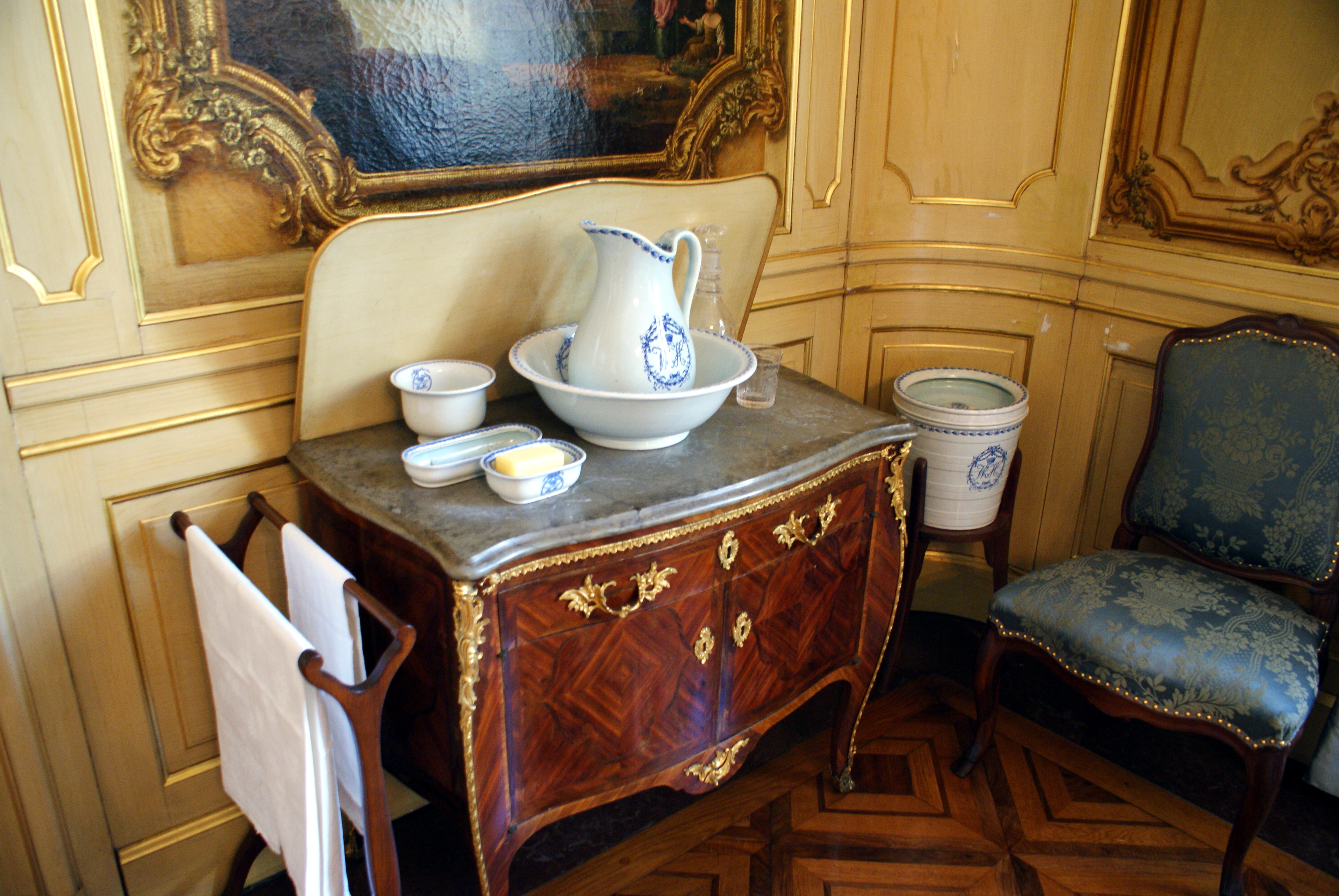 Byrå med utrustning för personlig hygien i Hallwylska Sängkammaren.